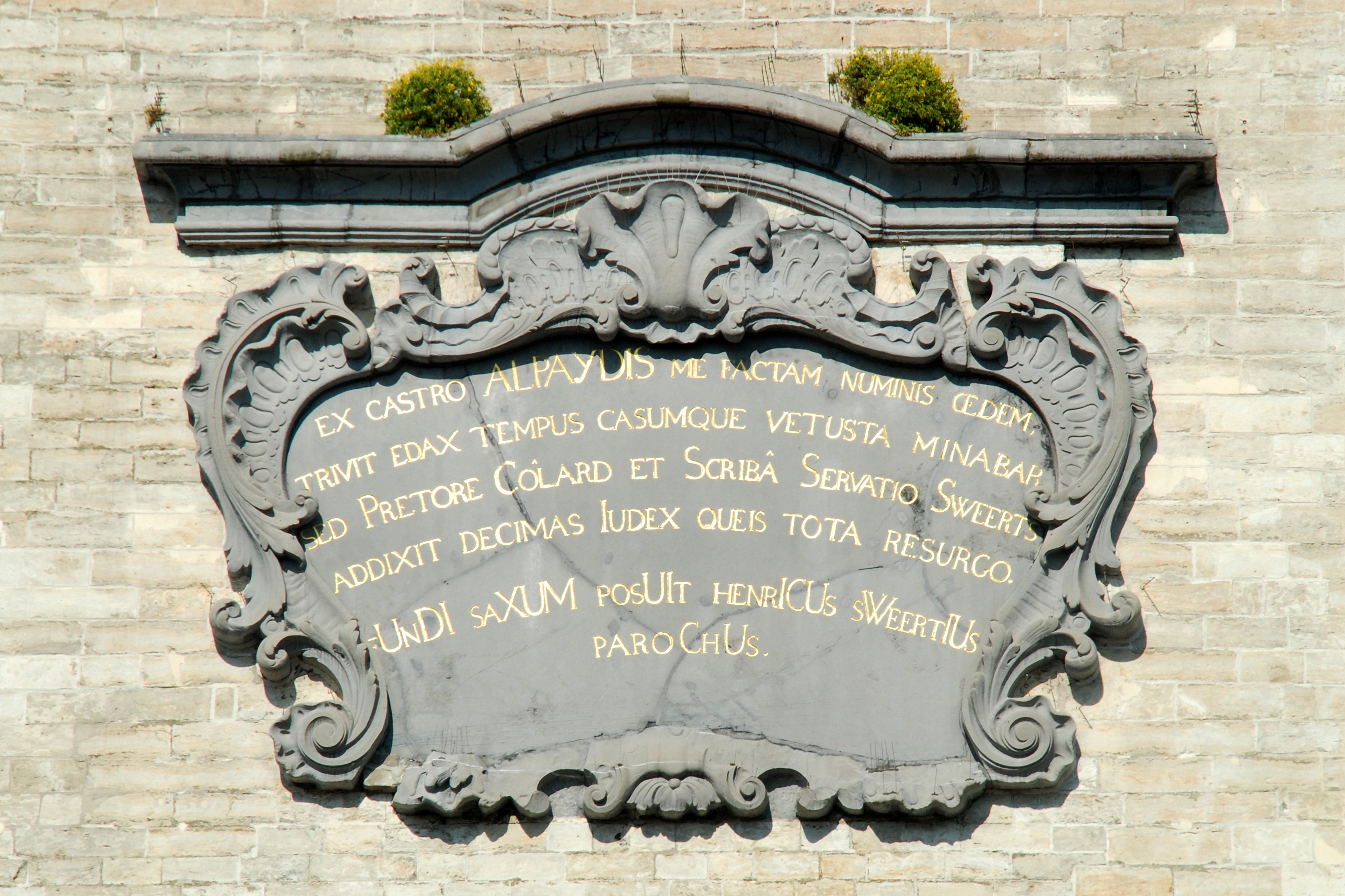 Belgique - Brabant flamand - Hoegaarden - Église Saint-Gorgon